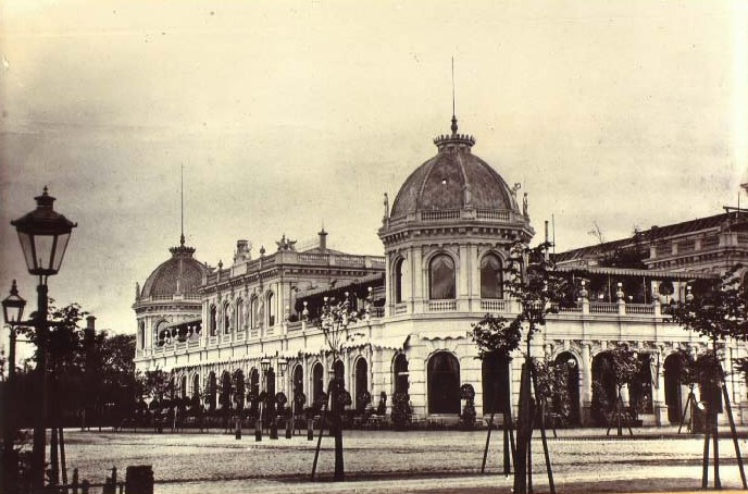 National Scala på Vesterbrogade